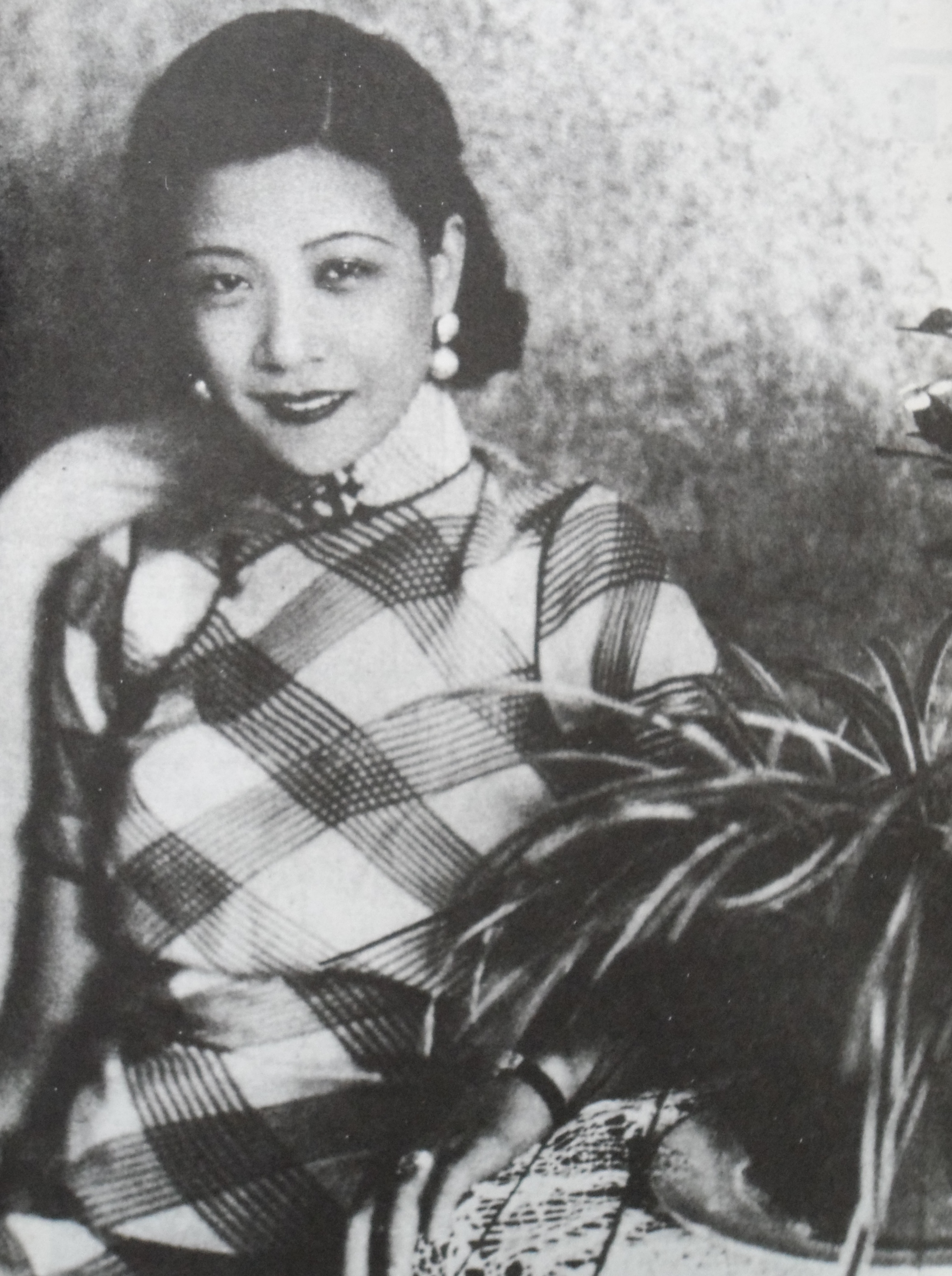 中国1930年代女影星阮玲玉